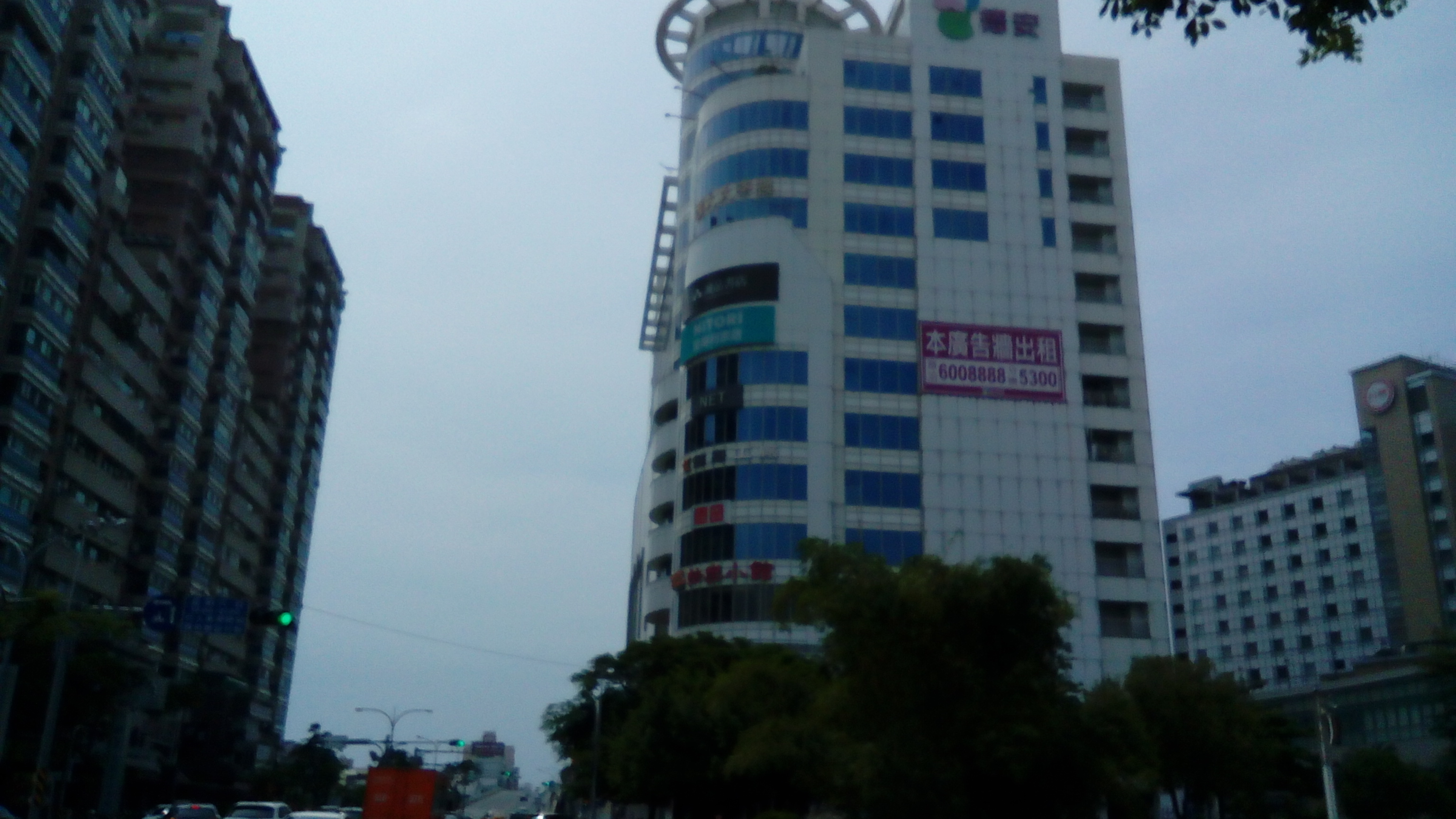 台南市東區 位於中華路橋旁